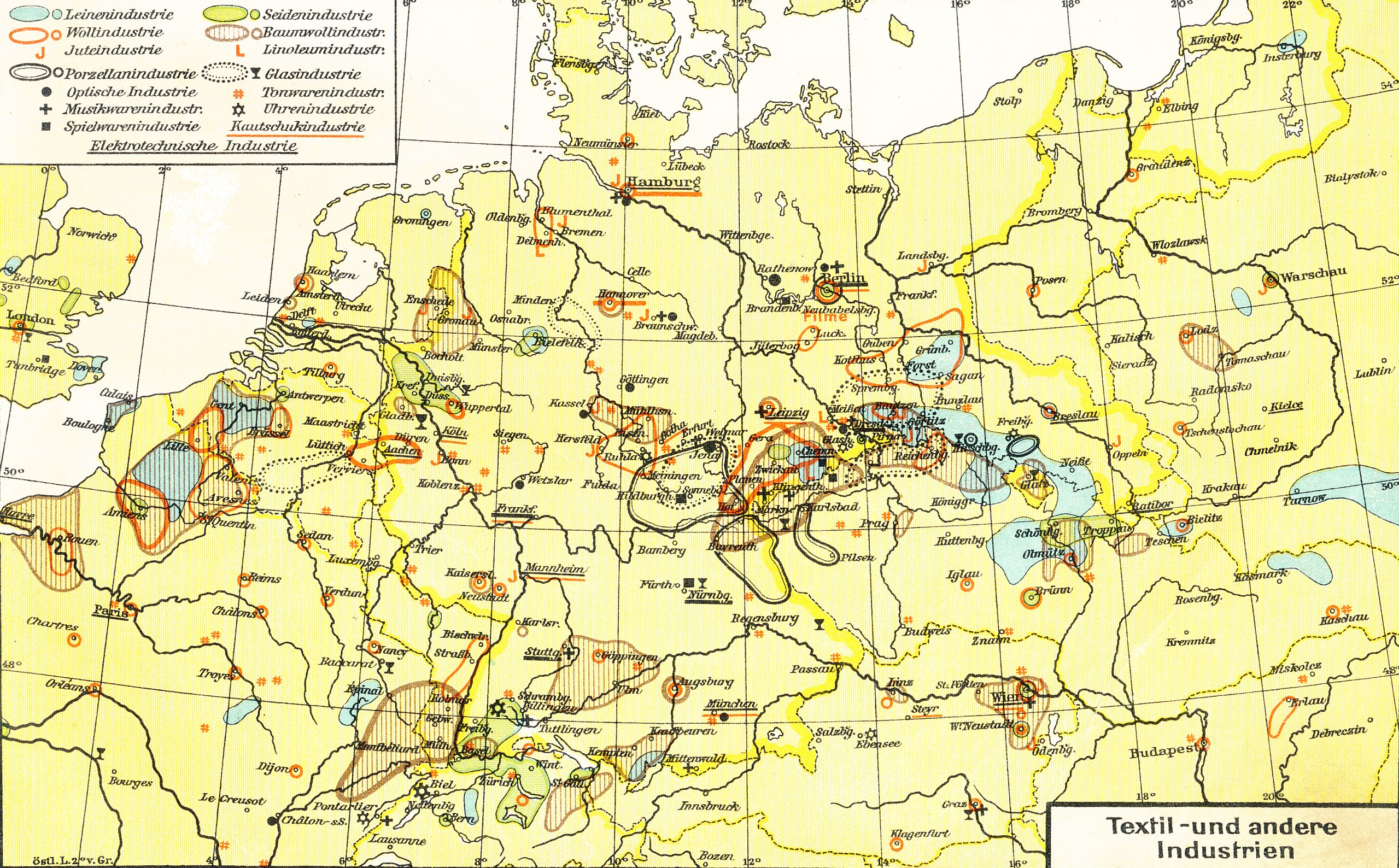 Deutschland, Textil- und andere Industrien This is a part of an old atlas. It does not represent the current situation.